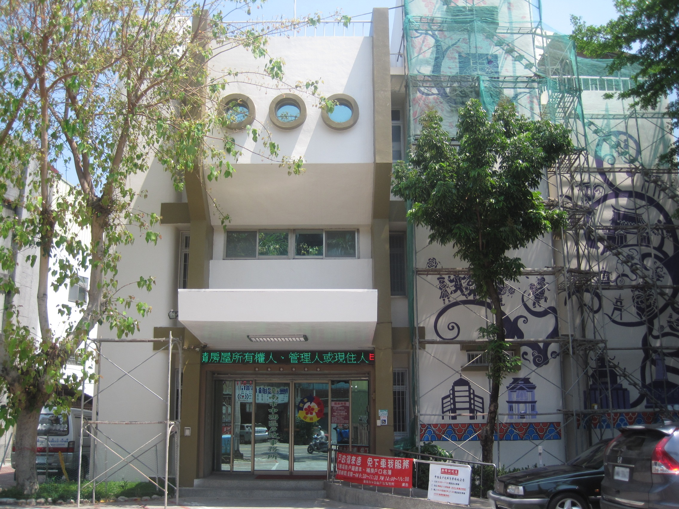 臺南市中西區戶政事務所，前西區區公所